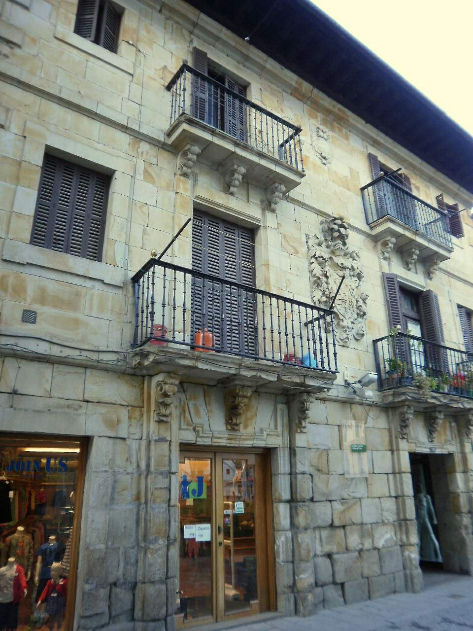 Arrasate - Palacio de Okendo